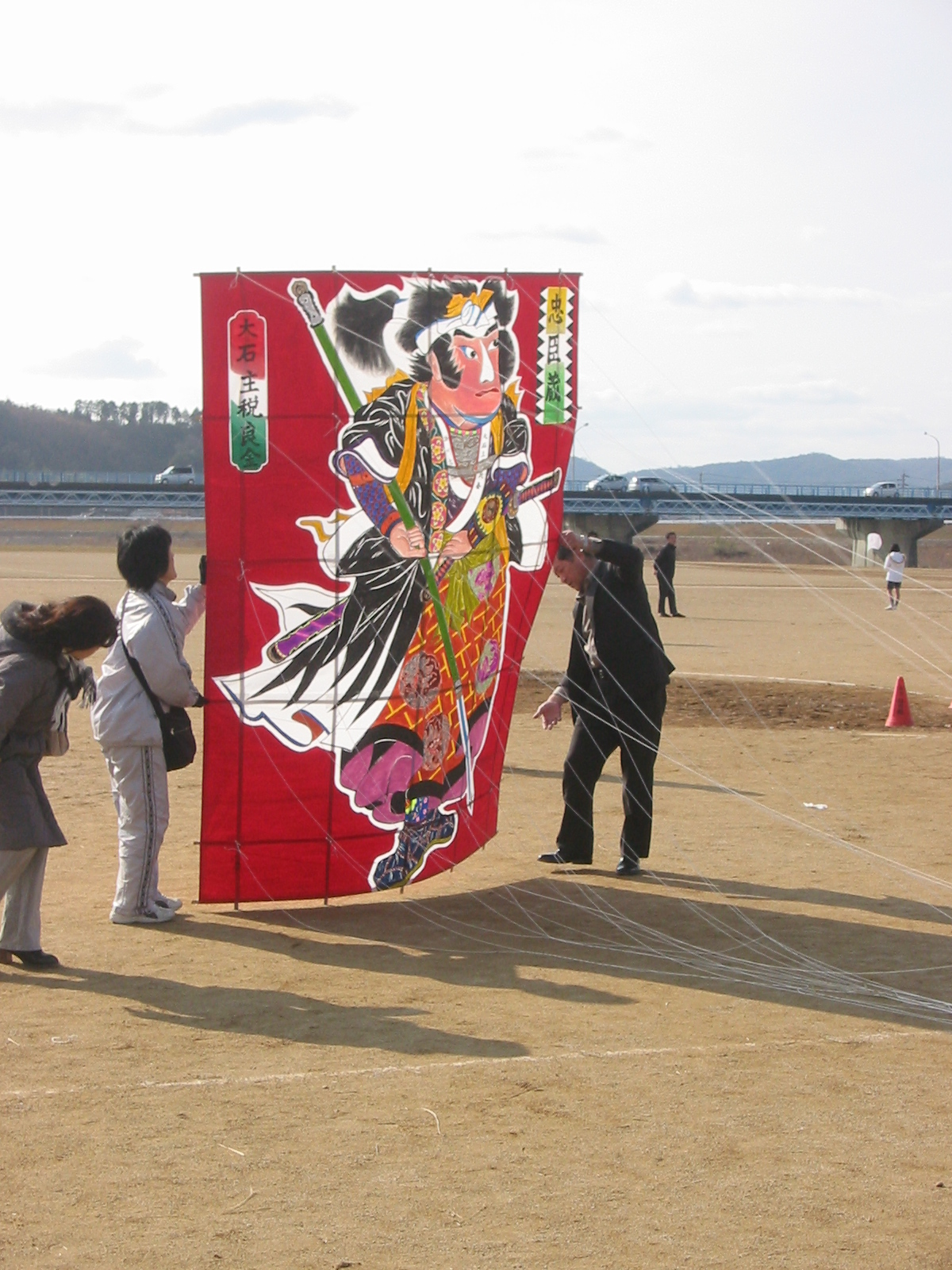 童謡の里龍野凧あげ祭り 播州角凧 大石主税良金